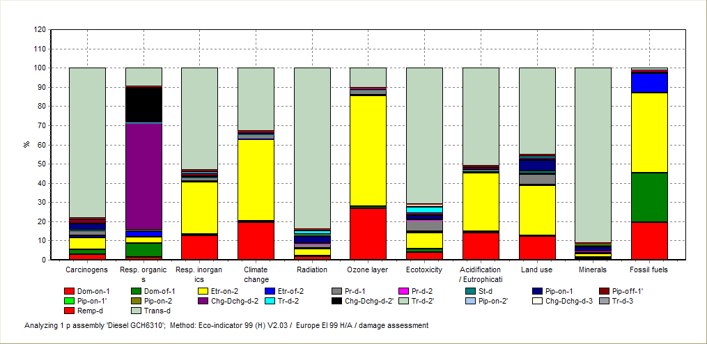 Exemple de résultat d'une analyse de cycle de vie du diesel à l'étape de la caractérisation. Cette analyse prend en compte toutes les étapes, de l'extraction à la consommation en tant que carburant. La caractérisation a été faite avec l'indicateur Eco-Indicator 99 Hierarchist selon les dix catégories proposées par Eco-Indicator. Les étapes dominantes en termes d'impact sont l'extraction du pétrole (Dom-on-1 : extraction onshore à dans le pays étudié, Dom-of-1 : extraction offshore à dans le pays étudié, Etr-on-1 : extraction onshore à l'étranger, Etr-of-2: extraction offshore à l'étranger ; chaque source répartie également) ainsi que la consommation du pétrole (trans-d). Auteur : Stéphane Guidoin, réalisé avec le logiciel SimaPro 6